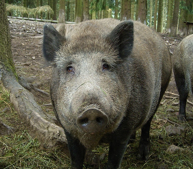 Saugatter im Gevelsberger Stadtwald, Brinkstraße in Gevelsberg